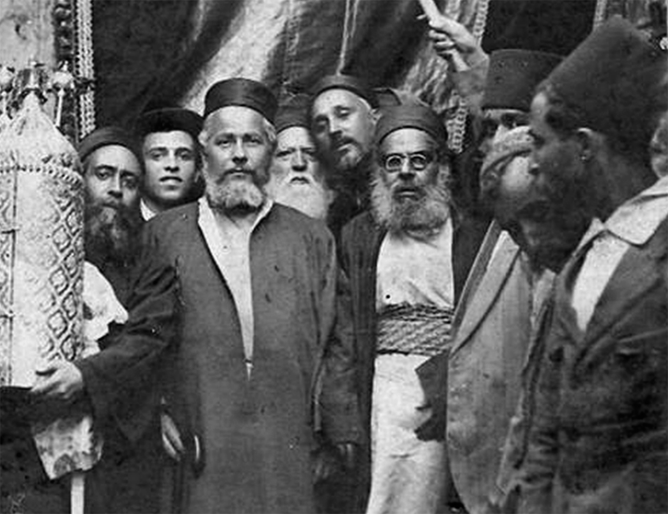 משמאל לימין במרכז: הרבנים יעקב זריהן ואליהו ילוז בשמחת תורה, טבריה 1940